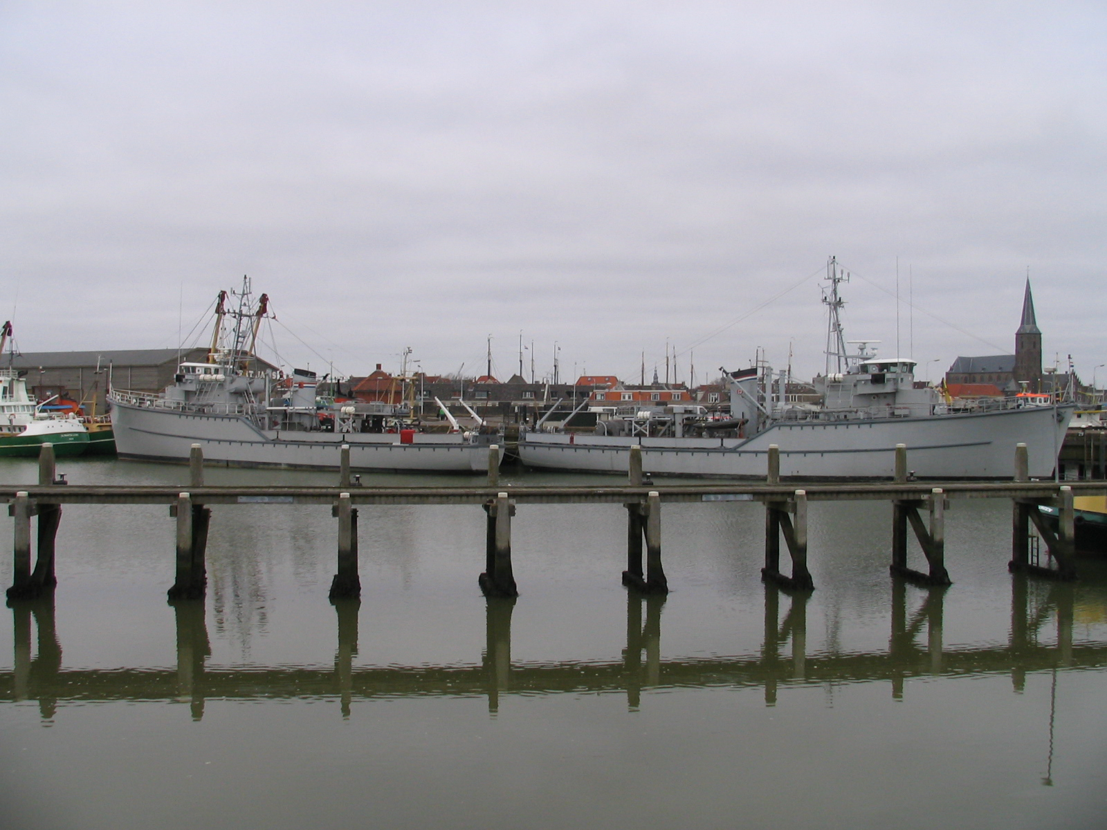 De twee ex-mijnenvegers van de Dokkumklasse Sittard en Naarden in de haven van Harlingen. Dit vlak voor een sponsortocht georganiseerd door het Zeekadetkorps Harlingen